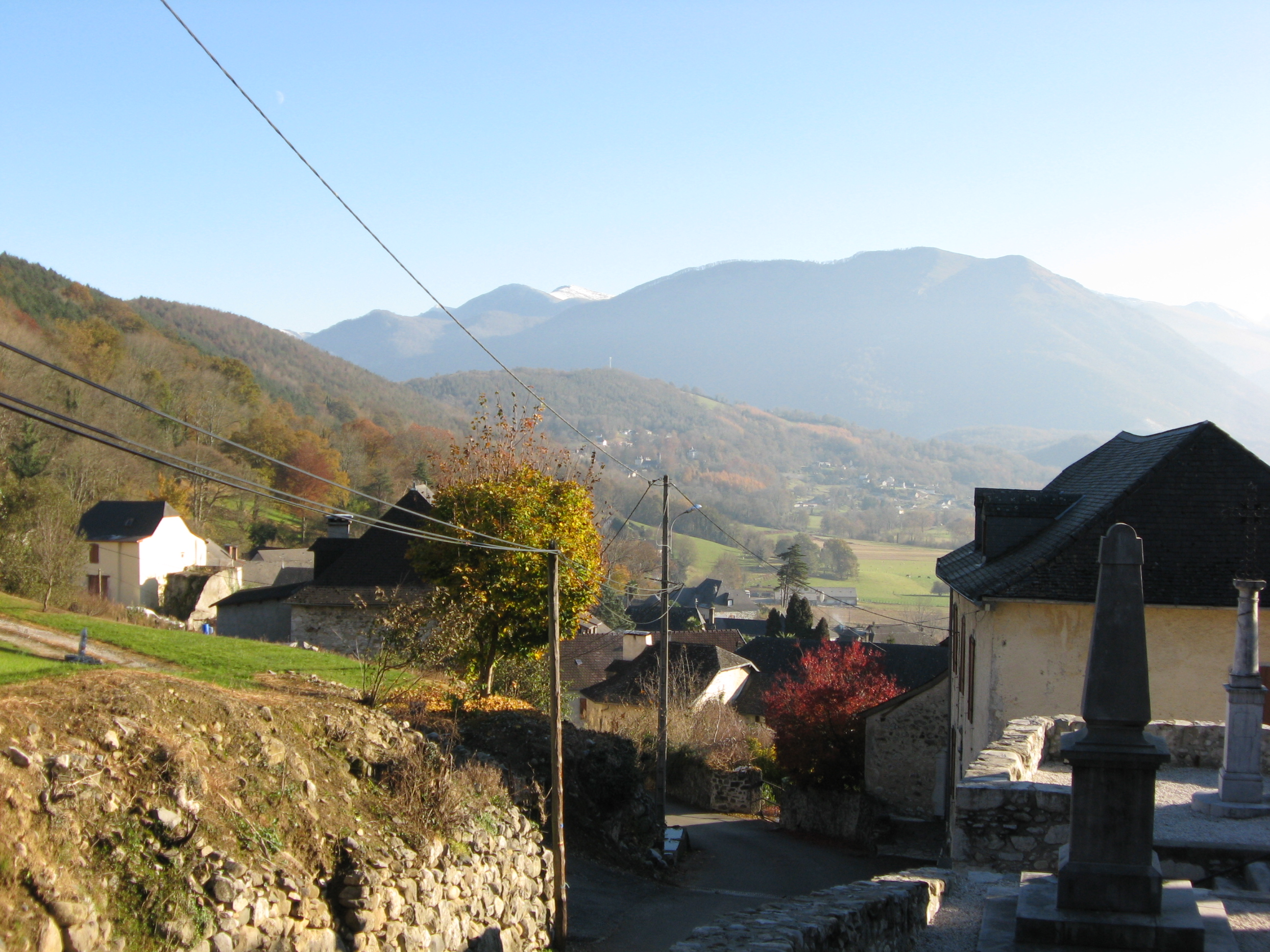 Chaine des Pyrénées vue depuis l'église Saint Lizier de Bescat (Pyrénées-Atlantiques) (Pyrénées).